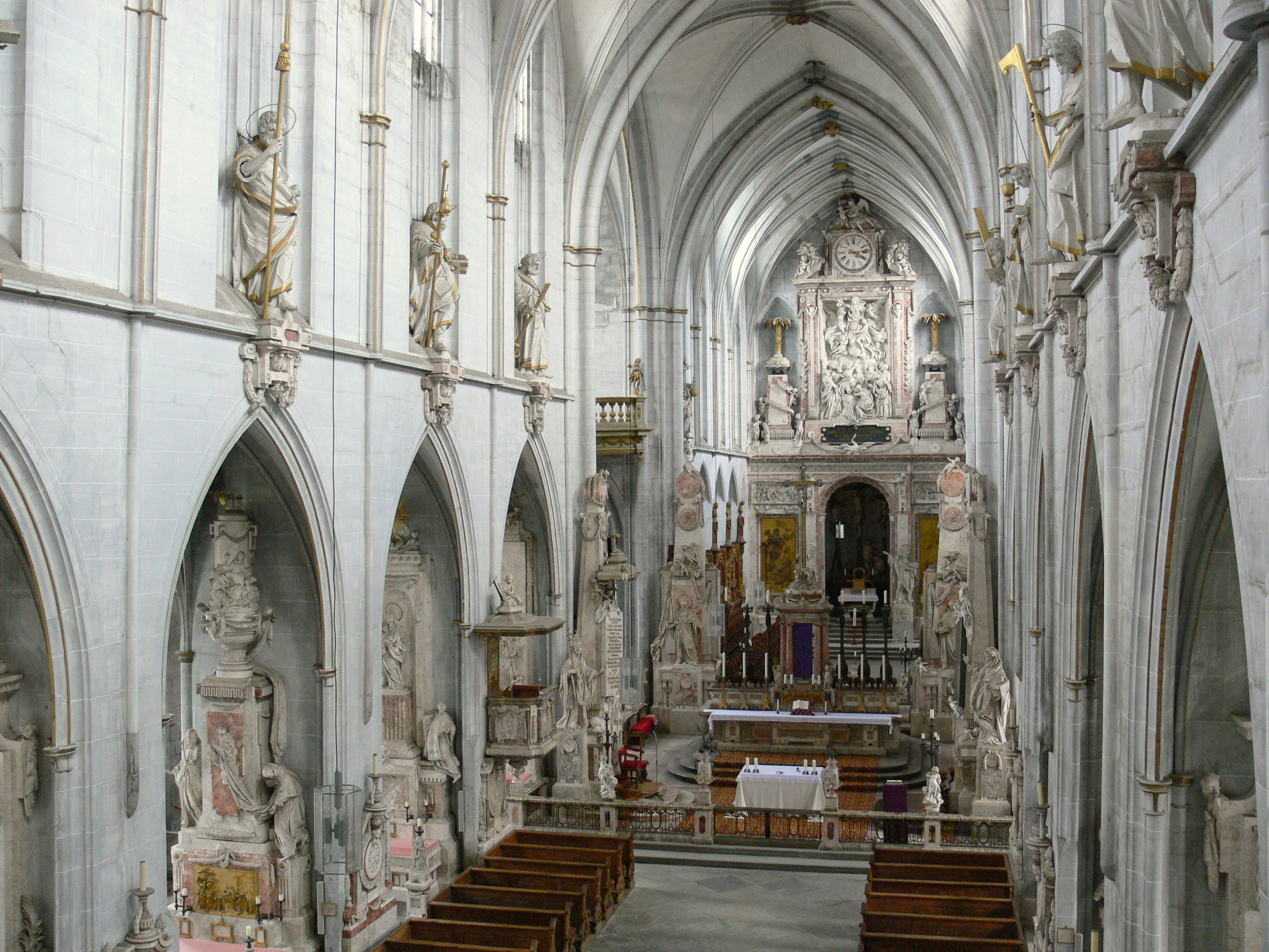 Description: Hauptschiff und Chor Source: User:Saberhagen Location: Salemer Münster, Salem (Baden), Germany Source: own photograph by uploader